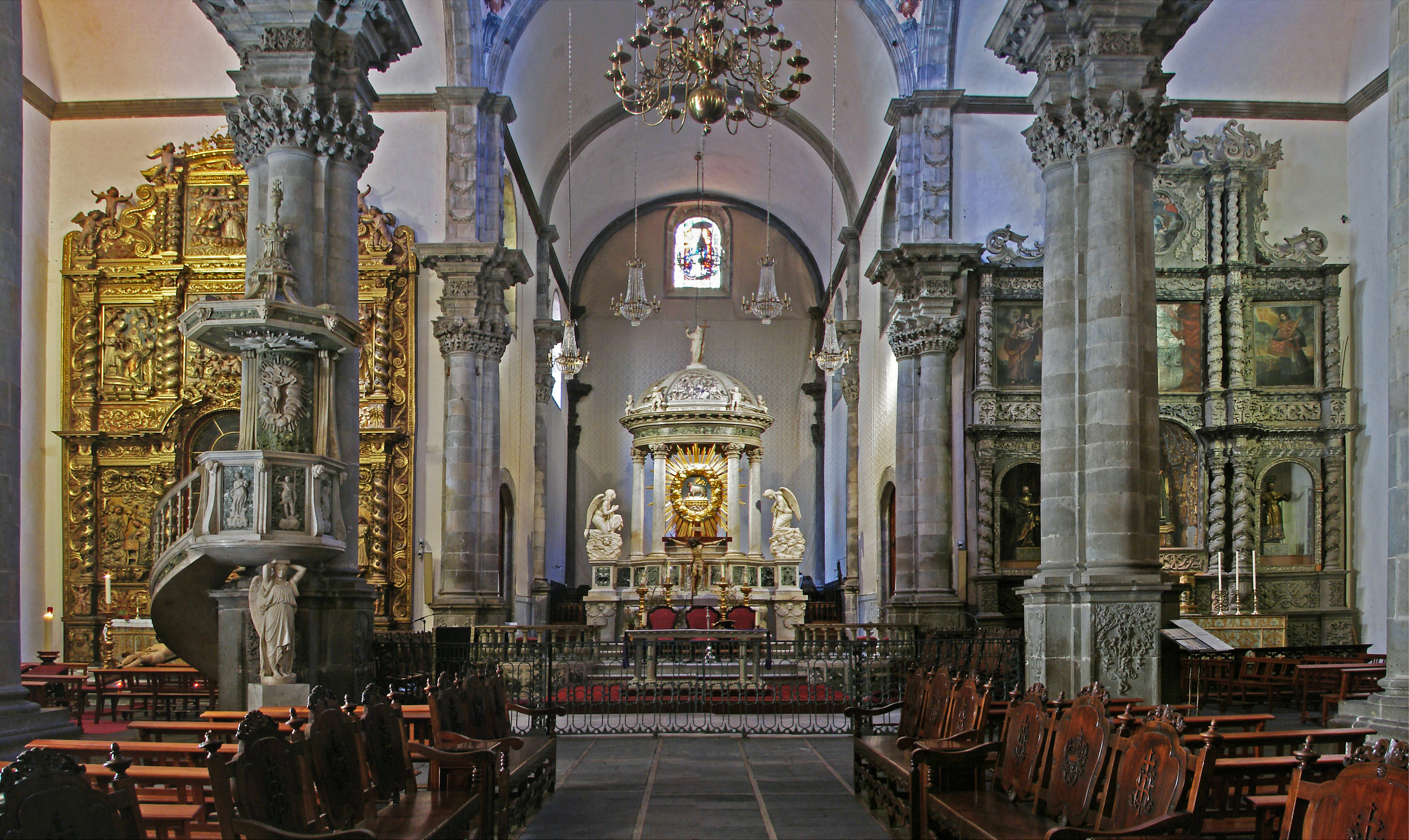 Altarraum der Kirche Concepción in La Orotava Teneriffa